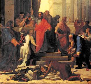 Pál apostol és az efeszoszi könyvégetők. Charles Alexandre Lesueur festménye